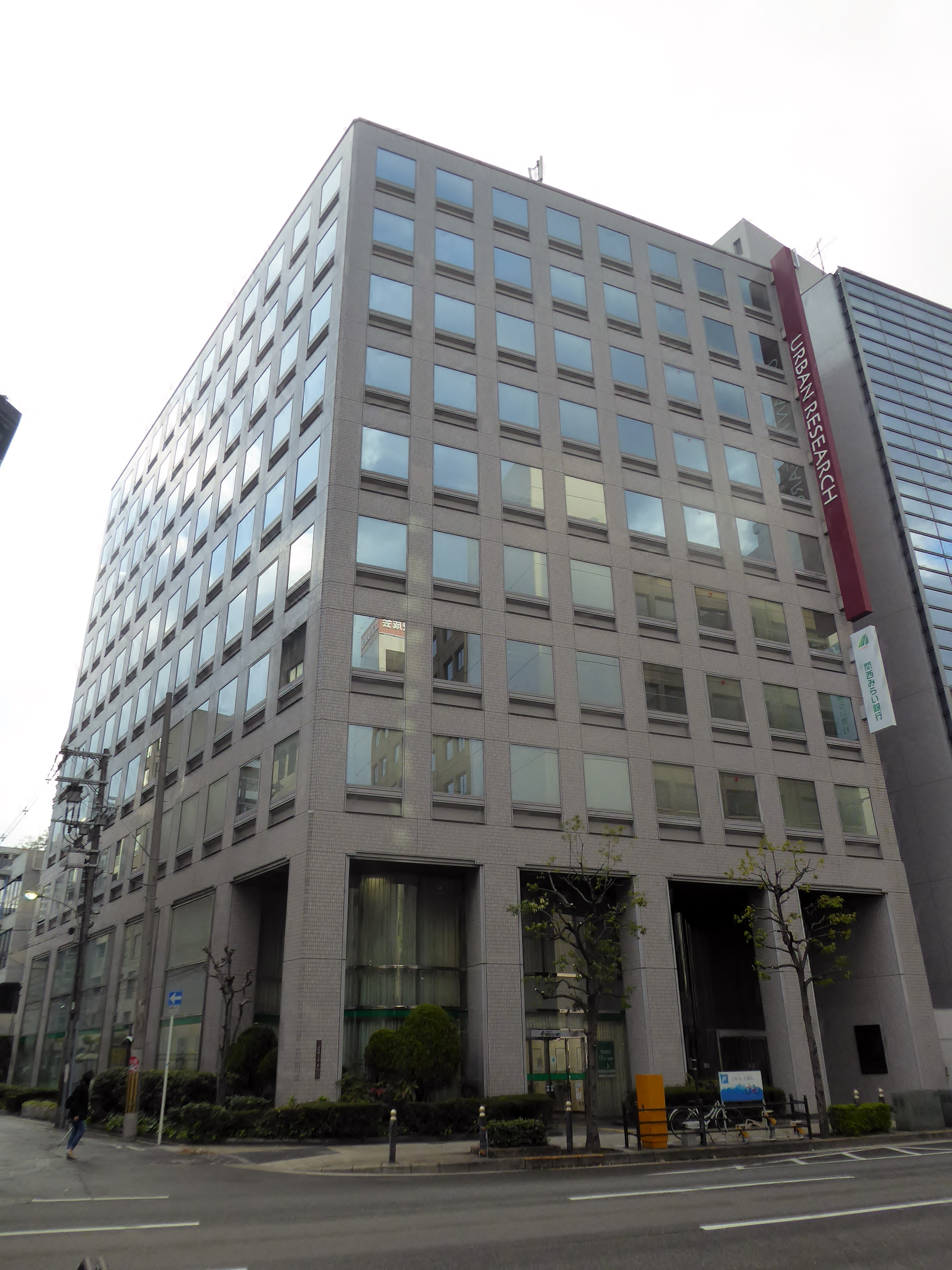 アーバンリサーチビルを撮影。